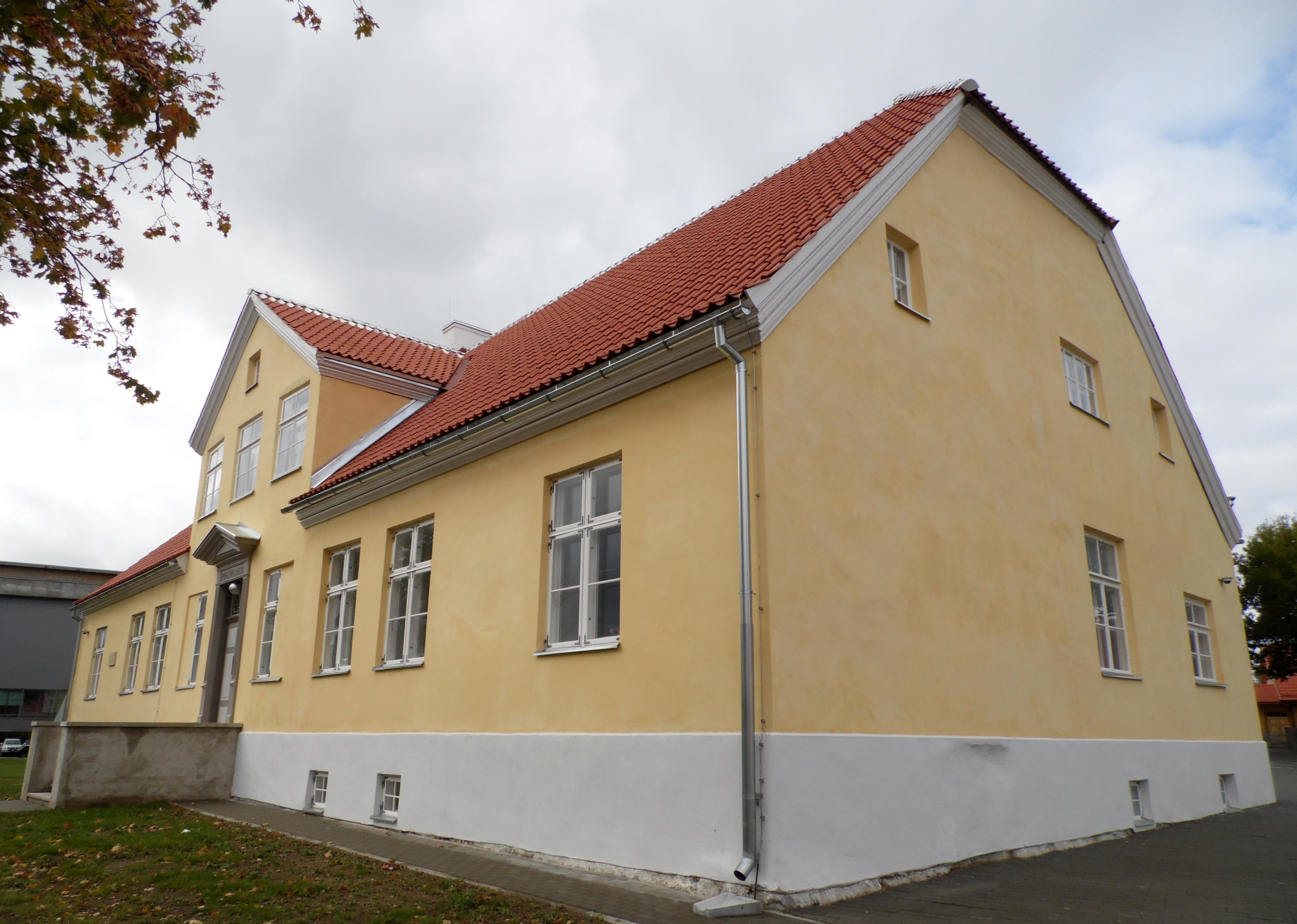 Koolihoonete kompleks 19.-20. saj. Läänemaa Ühisgümnaasium kannab edasi Haapsalu ja Läänemaa järjepidevat gümnaasiumiharidust, mis sai alguse juba 1918. aastal.